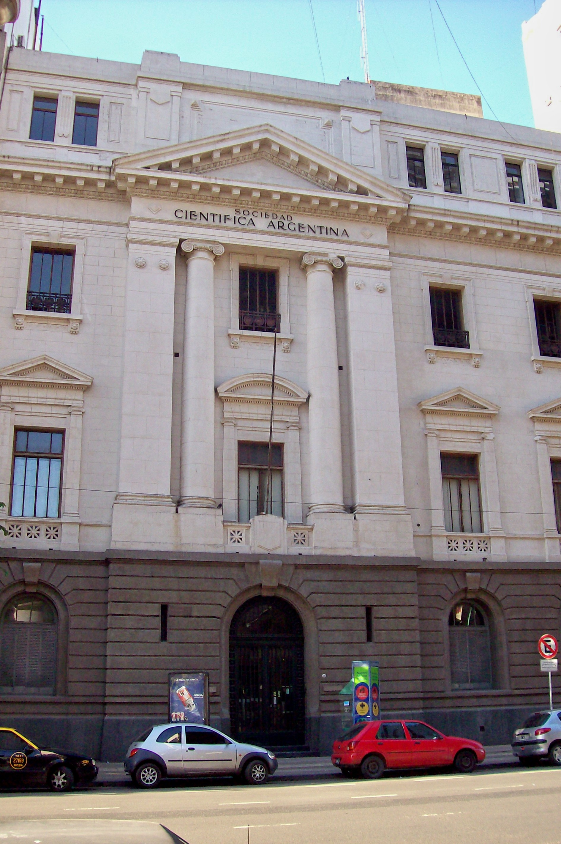 Sociedad Científica Argentina, Avenida Santa Fe 1145, en Retiro, Buenos Aires.